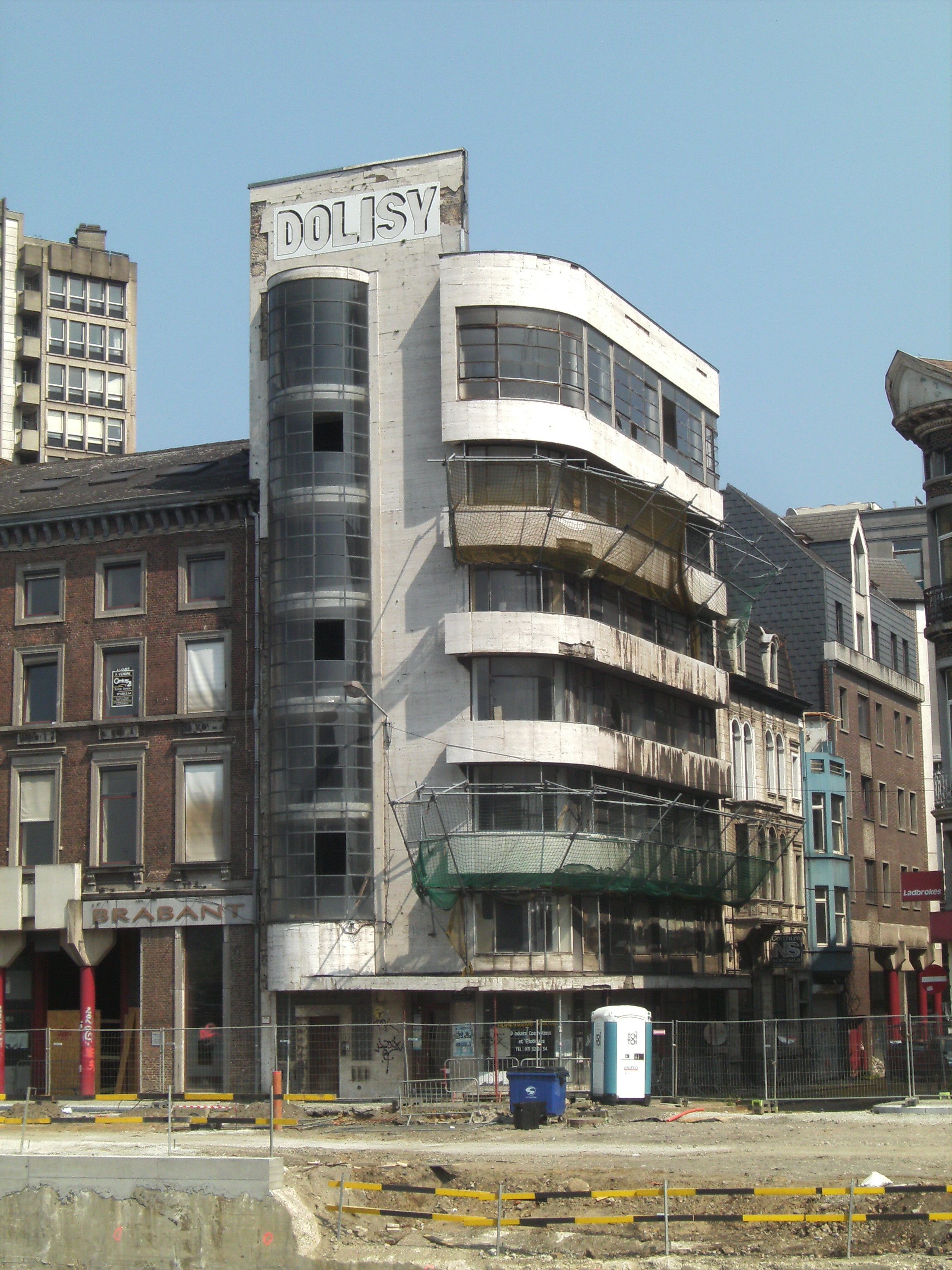 Immeuble dit "Pianos De Heug". Quai de Brabant, 5, 6000 Charleroi (Belgique). Construction 1933. Architecte Marcel Leborgne